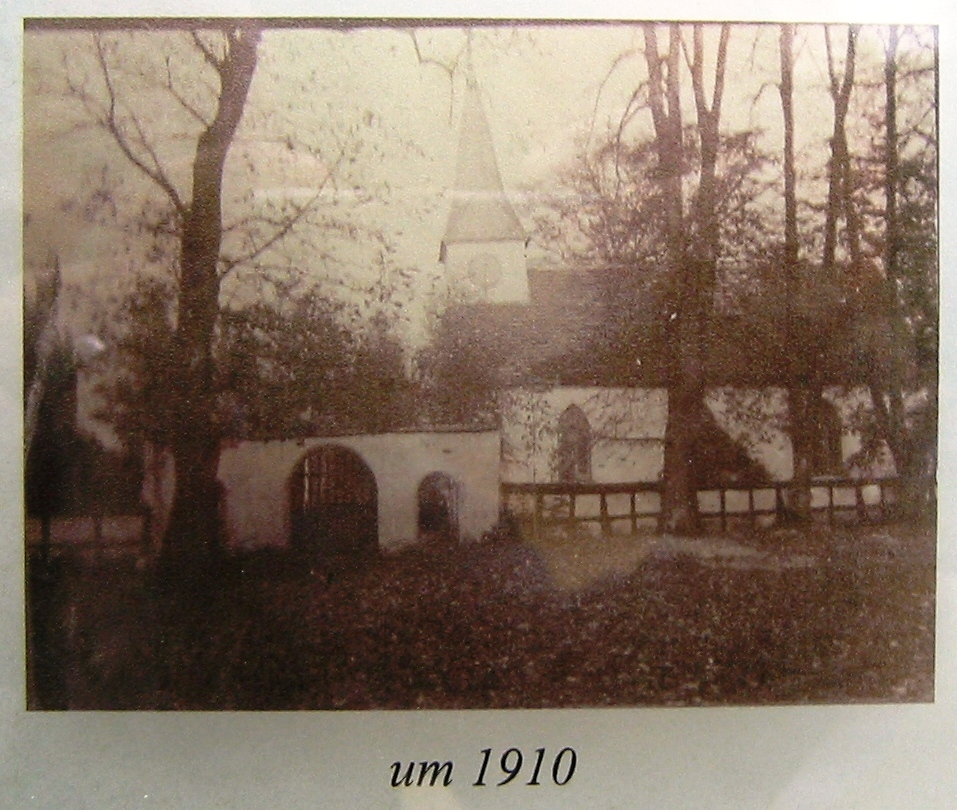 Abbildung der Kapelle in Ludwigsburg um 1910, aufgenommen auf einer öffentlich zugänglichen Tafel an der Kapelle in Loissin